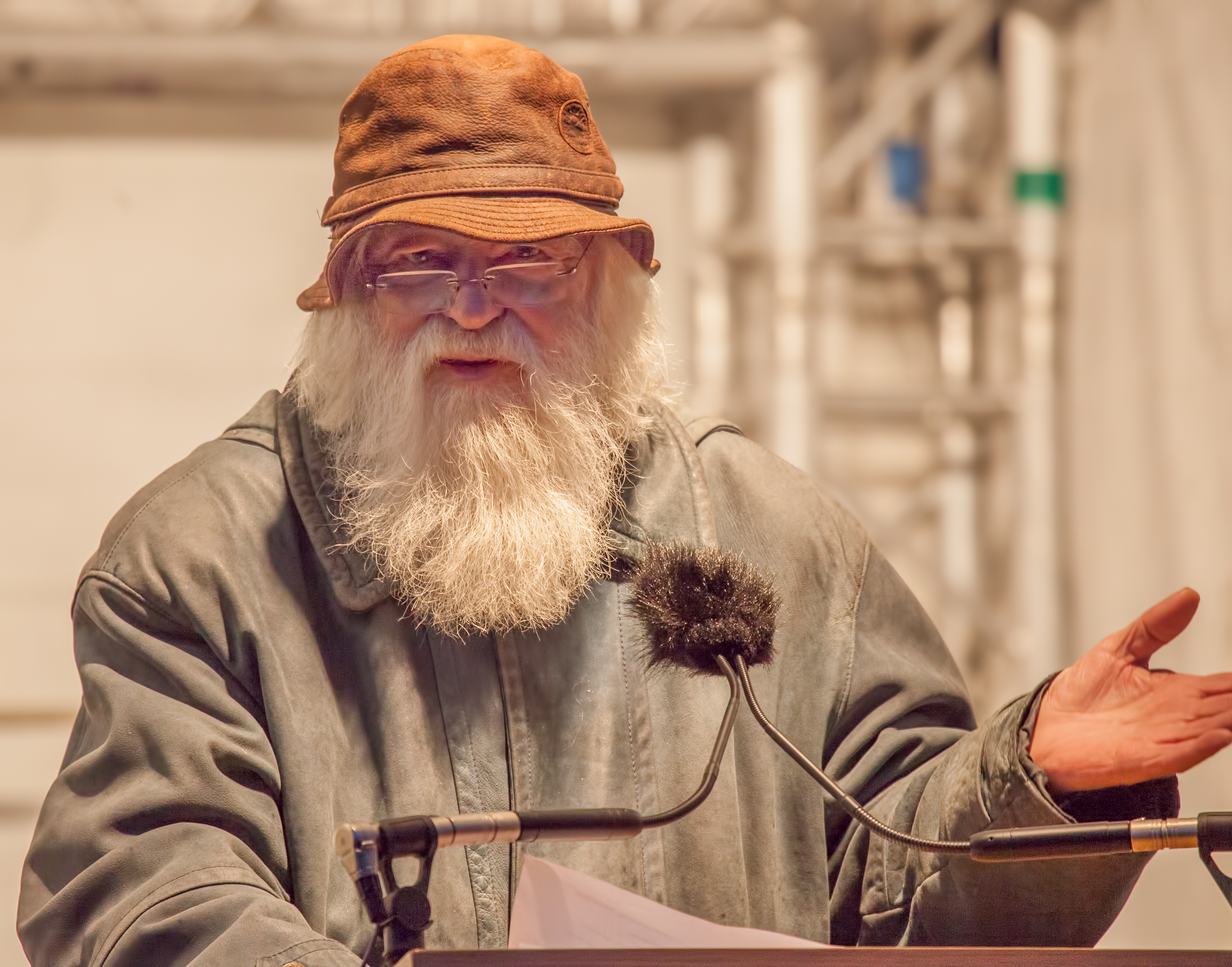 Ebbe Schön welcomes spring during Valborgborgsmässoafton at Skansen Stockholm 2013